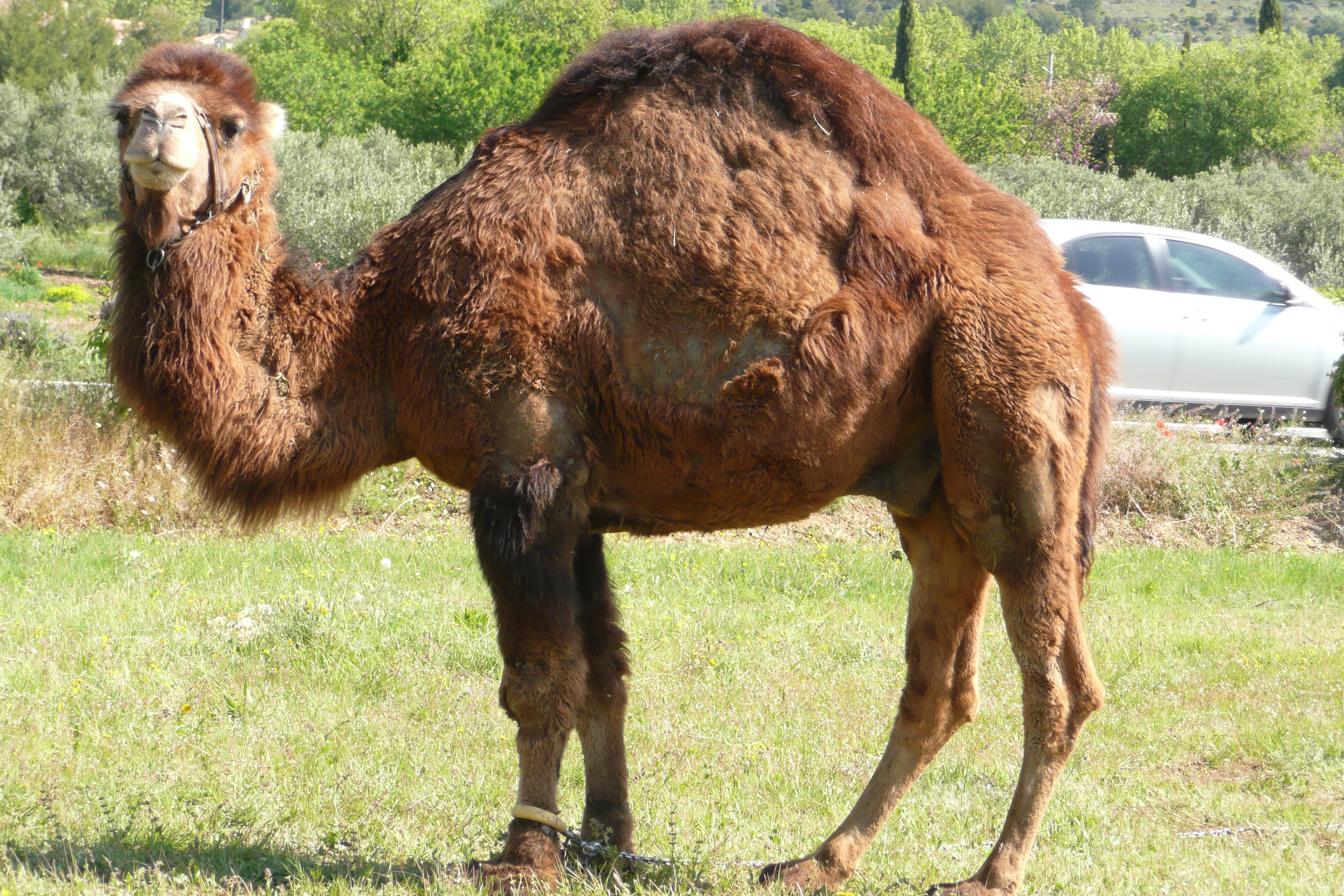 Camelus dromedarius près de Mérindol.